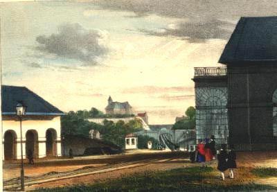 Vieille image, tableau Henri BORREMANS Ligne de Bruxelles à la frontière de Prusse - Vue des Plans inclinés à Liège 1843 Origine : Collections scientifiques de l'Université de Liège